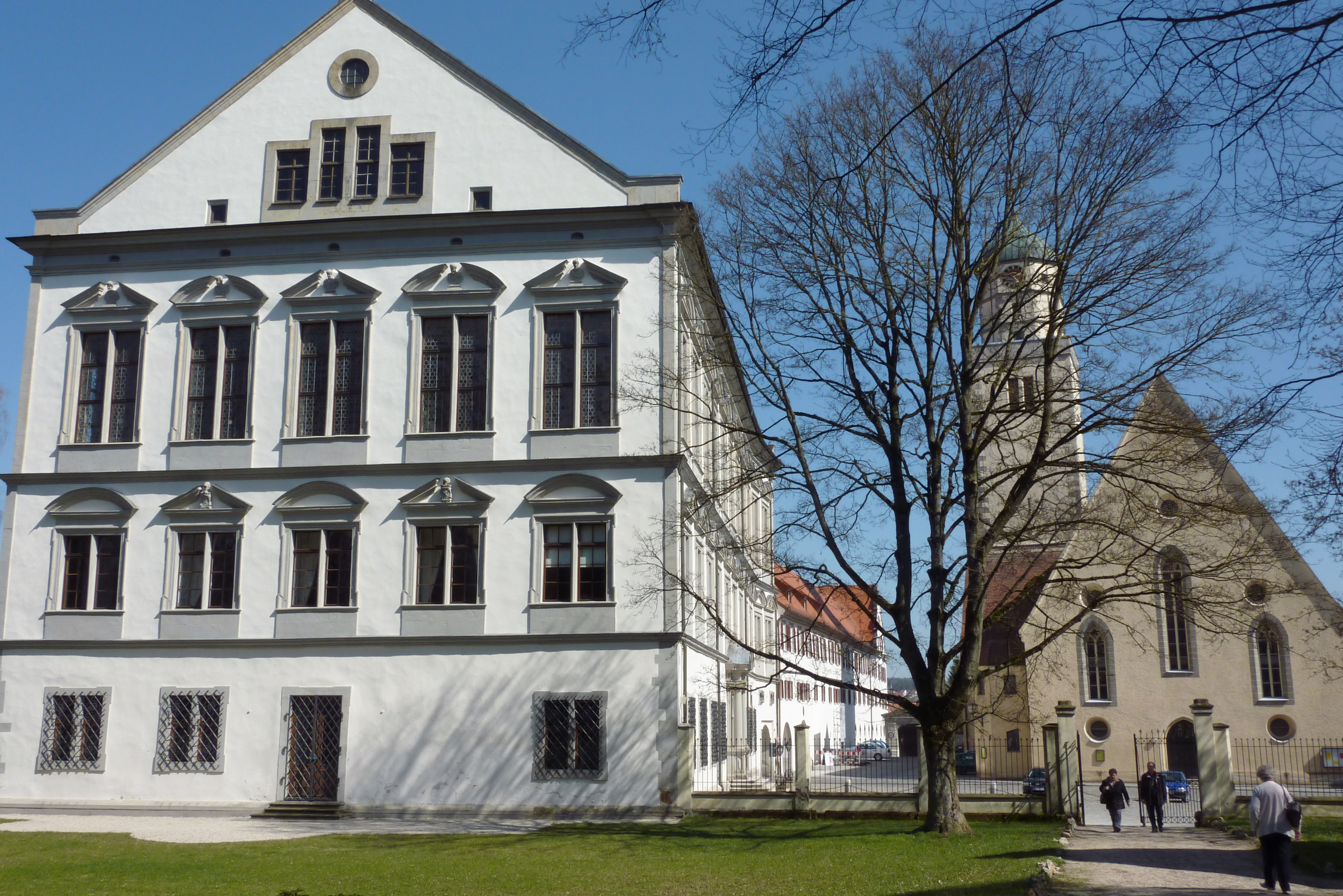 Schloss und evangelische Pfarrkirche St. Jakob in Oettingen im Landkreis Donau-Ries (Bayern)